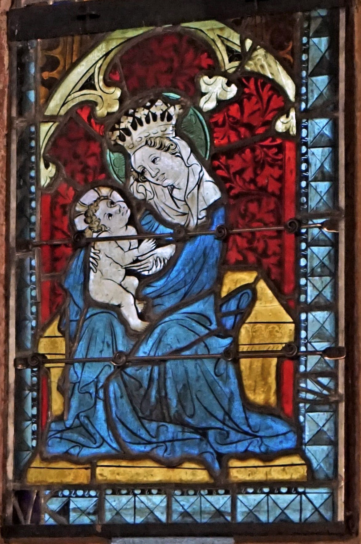 Kath. Filialkirche, Wallfahrtskirche Maria Höfl, Metnitz, Farbfenster, Glasmalerei